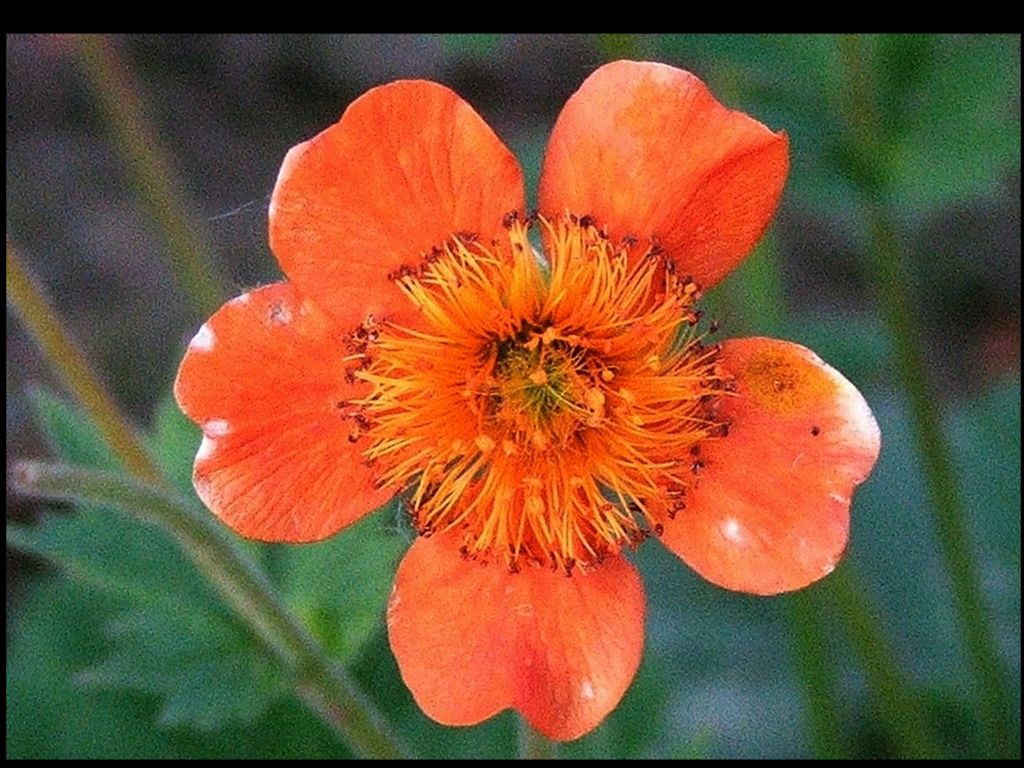 Geum coccineum (pl. kuklik szkarłatny)